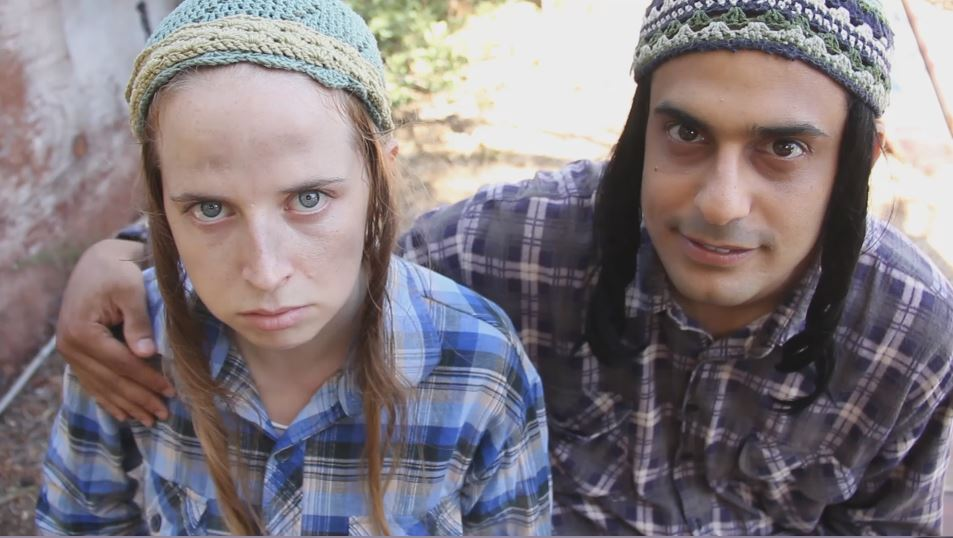 יוגב יפת וגיה באר גורביץ' בתפקיד אליקים ובנהאל